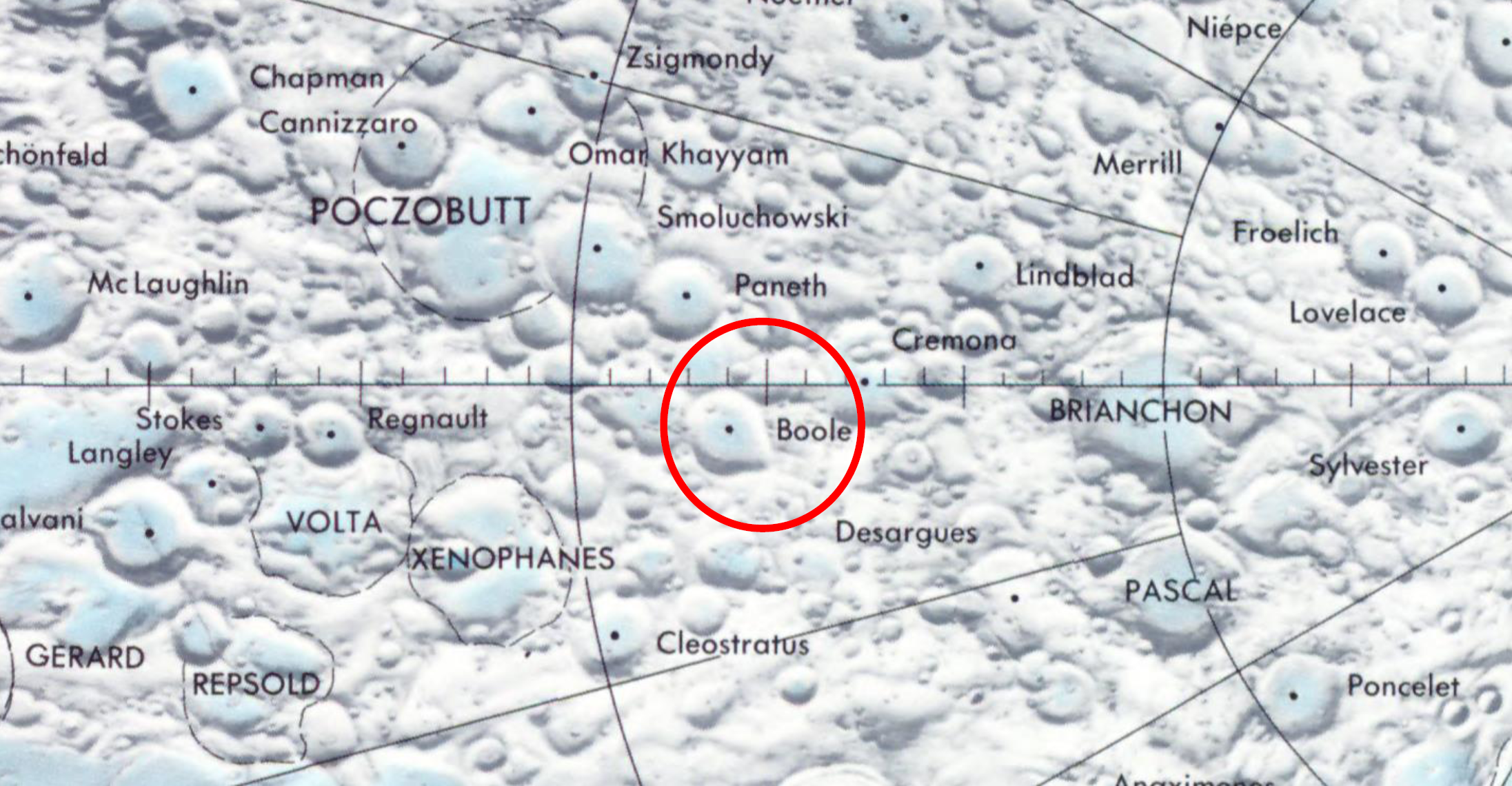 Detalle de la imagen Moonmap from Moon Map - Noert Polar Region - LPC1 - NASA. Localización del cráter Boole